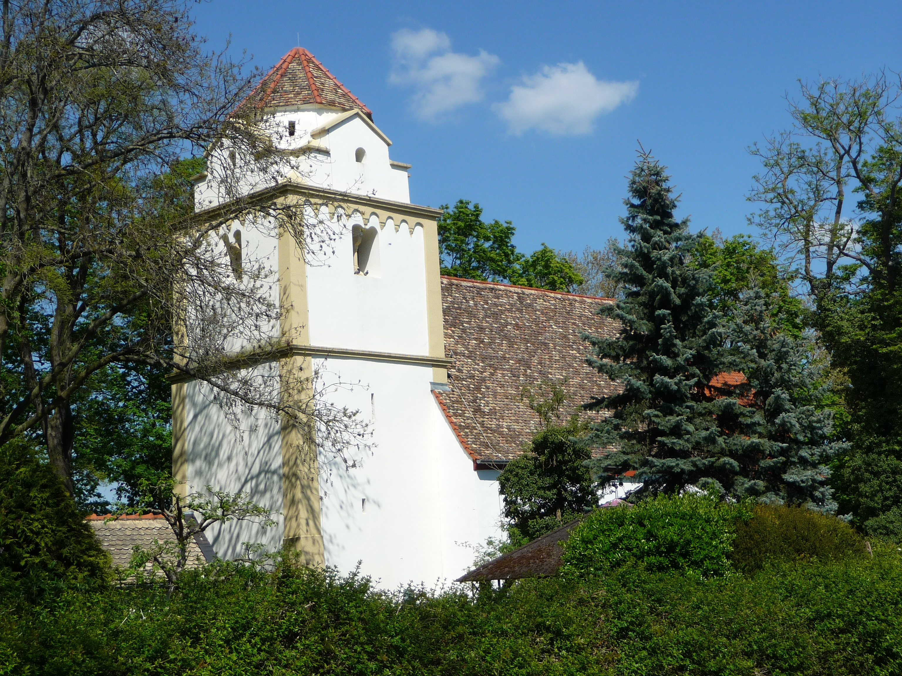 Die evangelische Kirche St. Bonifatius liegt am Rande von Alsheim, Rheinland-Pfalz, in einem Friedhofspark.